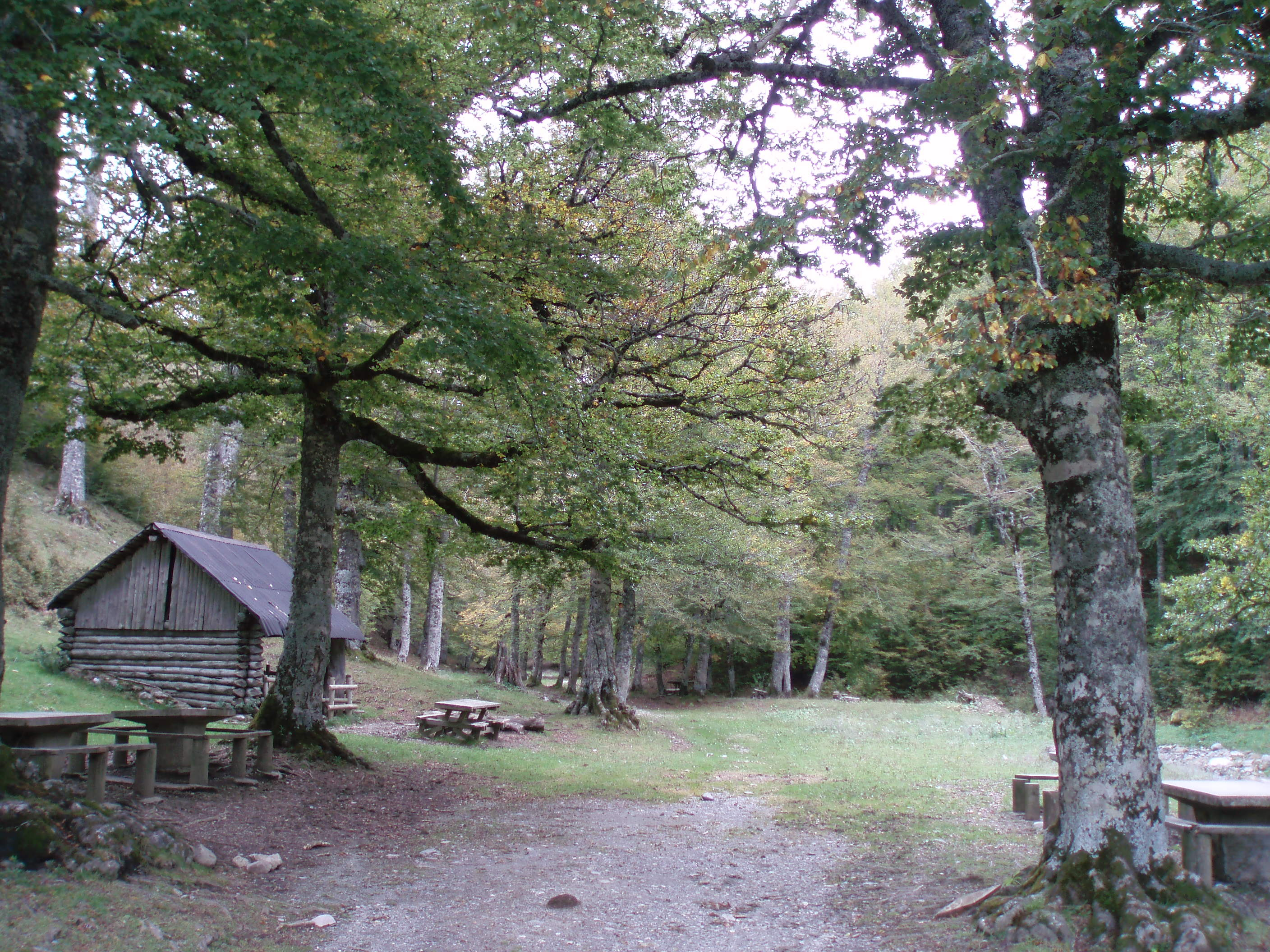 vista de Zuriza, pirineo aragonés (Huesca-España. Otoño 2006. autor:Luis Pérez Ayala